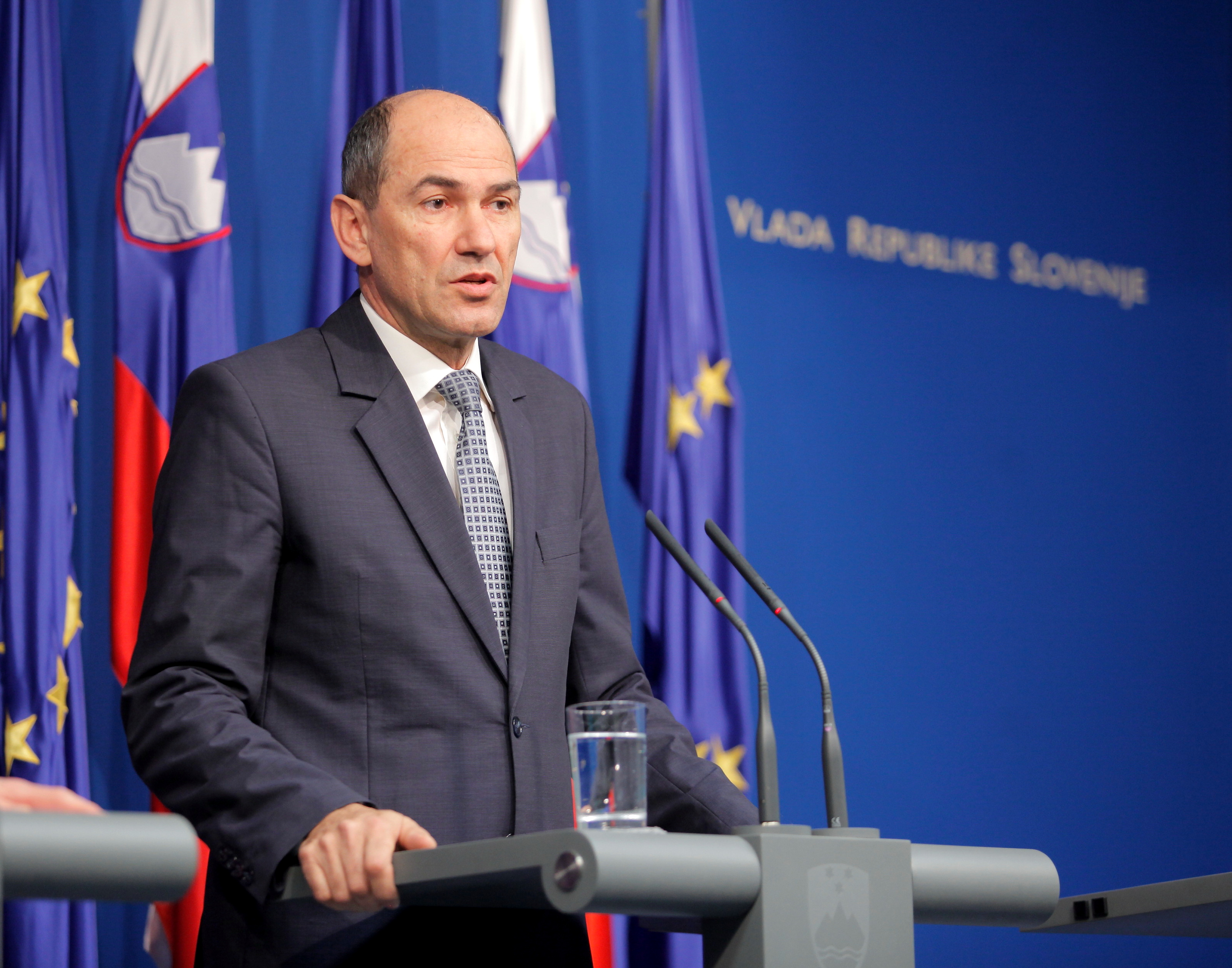 Na novinarski konferenci po seji vlade je nastopil predsednik Vlade RS Janez Janša.